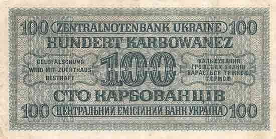 Карбованці за часів фашистської окупації: Карбованці за часів фашистської окупації